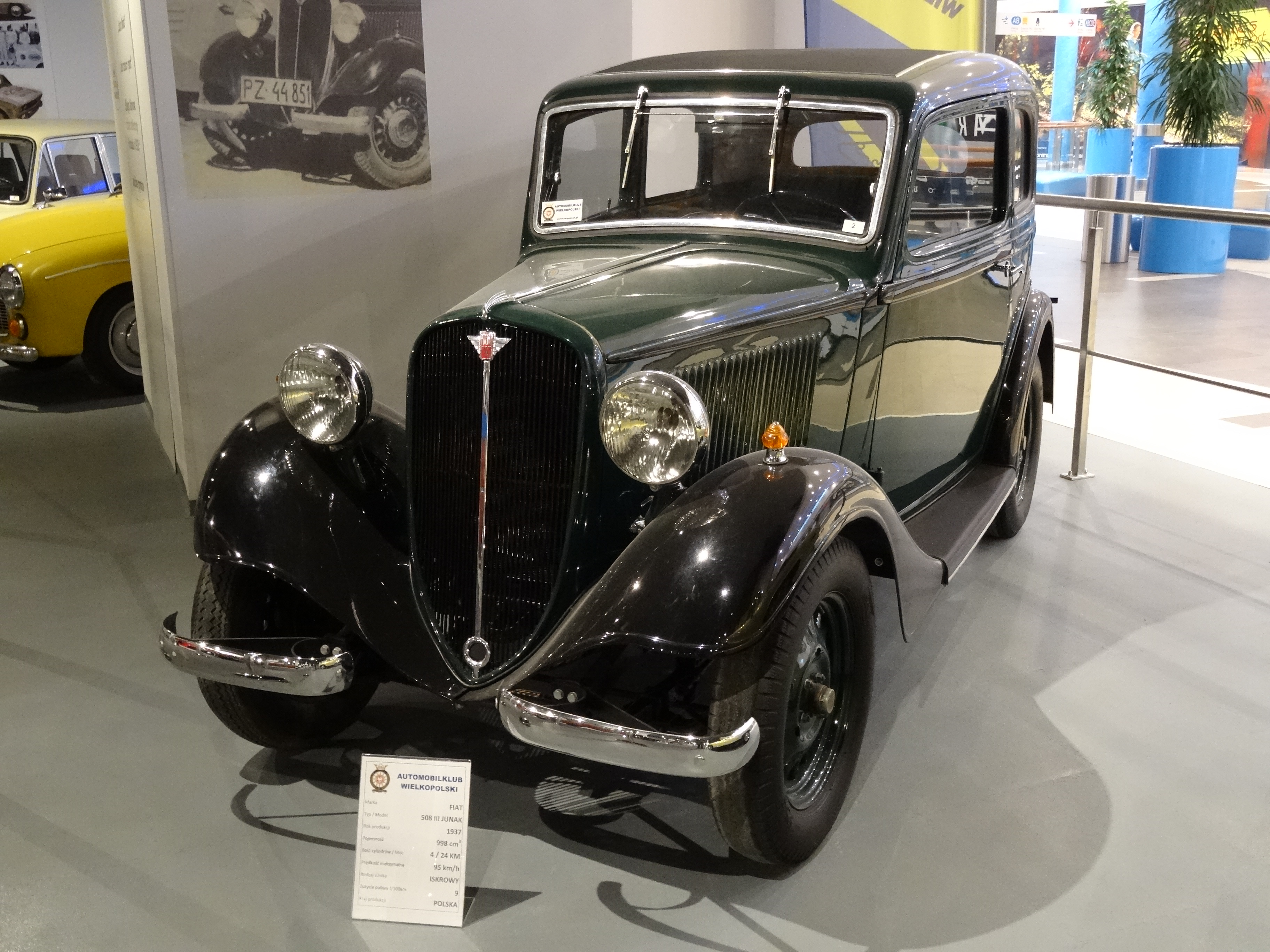 Fiat 508 III Junak, Polska, 1937 r.